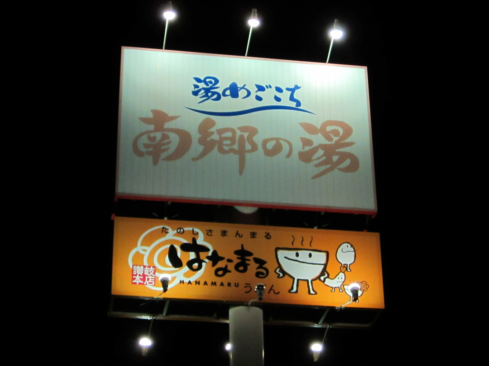 南郷の湯（北海道札幌市白石区）